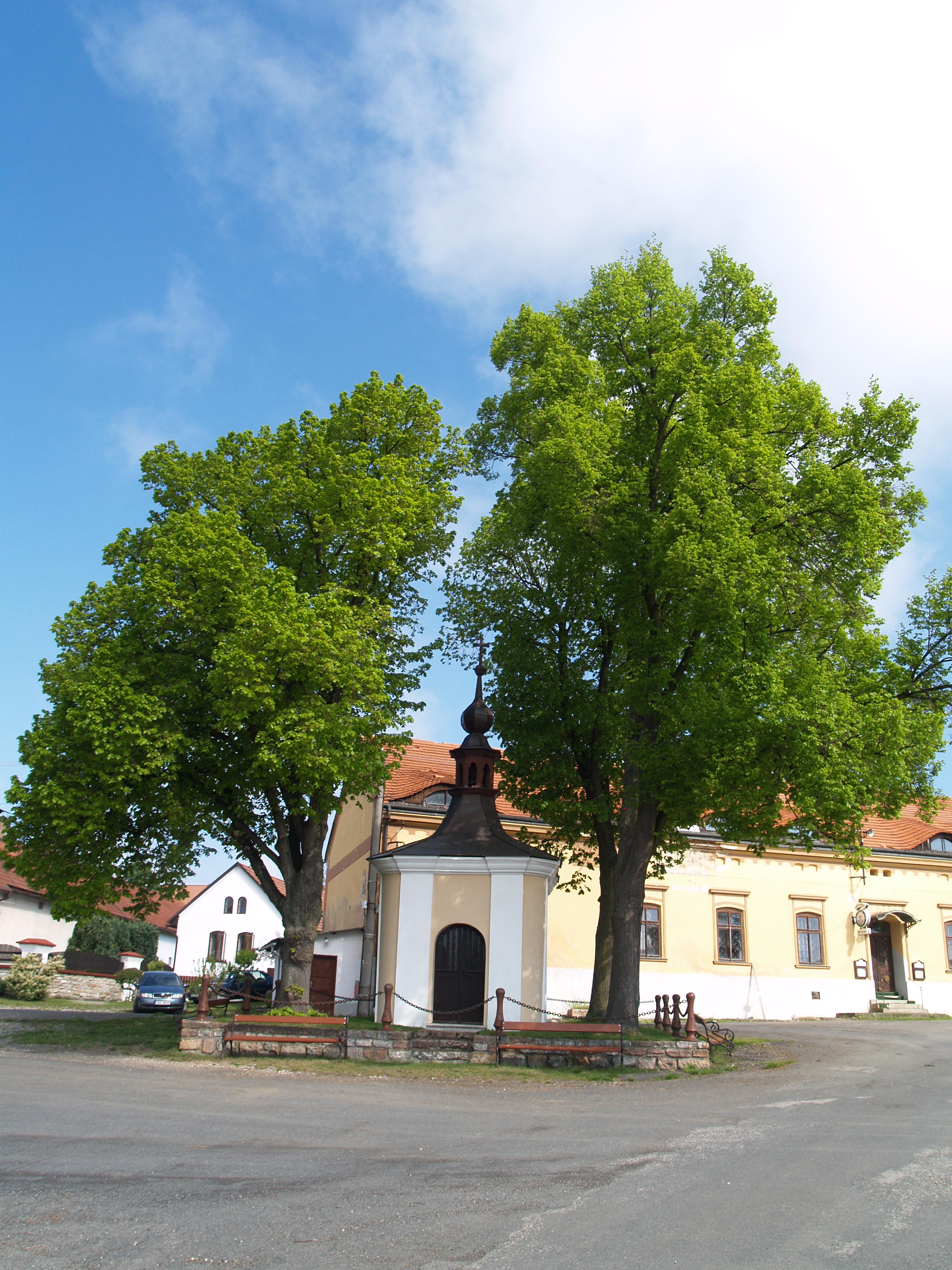 Barokní kaplička Svaté Trojice z roku 1841.